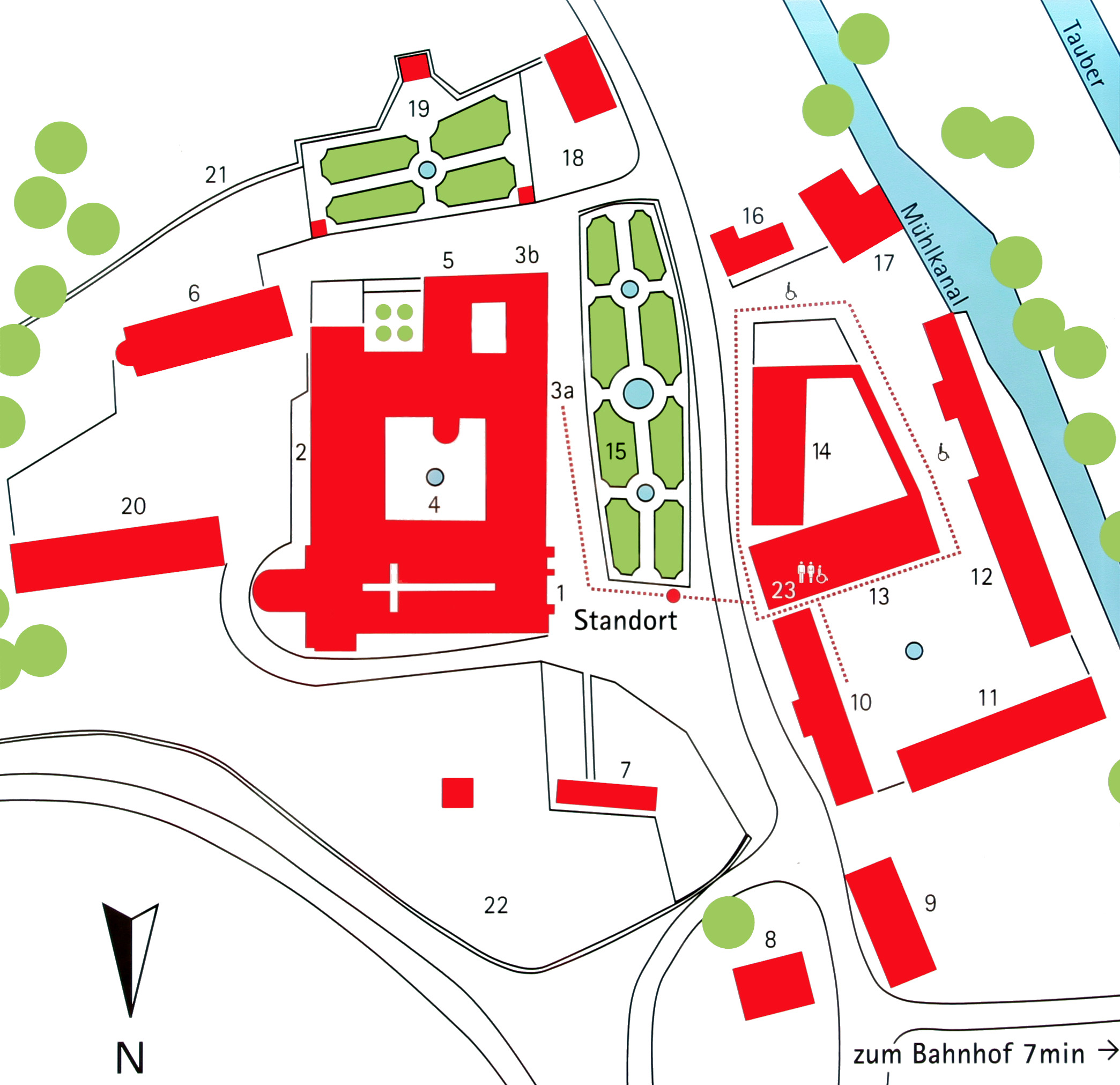 Schautafel mit Lageplan des Klosters Bronnbach. Steht vor der Klosterkirche. Siehe unten. Grafik retuschiert und korrigiert. 1) Kirche 2) Konventbau und Kapelle 3) Prälatenbau 4) Kreuzgang 5) Refektorium; Josephsall, Bernhardsaal 6) Archivverbund Main-Tauber (ehemaliges Spital) 7) Orangerie 8) Gasthaus 9) Fraunhofer Institut (ehemalige Remise) 10) Gästehaus Bursariat (ehemalige Klosterverwaltung) 11) Fraunhofer Institut (ehemaliger Rinderstall) 12) Remise (ehemaliger Pferdestall) 13) Museumsscheune (ehemaliger Fruchtspeicher) 14) ehemalige Wirtschaftsgebäude 15) Abteigarten 16) Privathaus (ehemalige Bäckerei) 17) Wasserkraftwerk (ehemalige Mühle) 18) Privathaus (ehemaliges Brauhaus) 19) Saalgarten (Biergarten) 20) ehemalige Remise 21) Klostermauer 22) Klosterweinberg 23) Toilette/Behindertentoilette